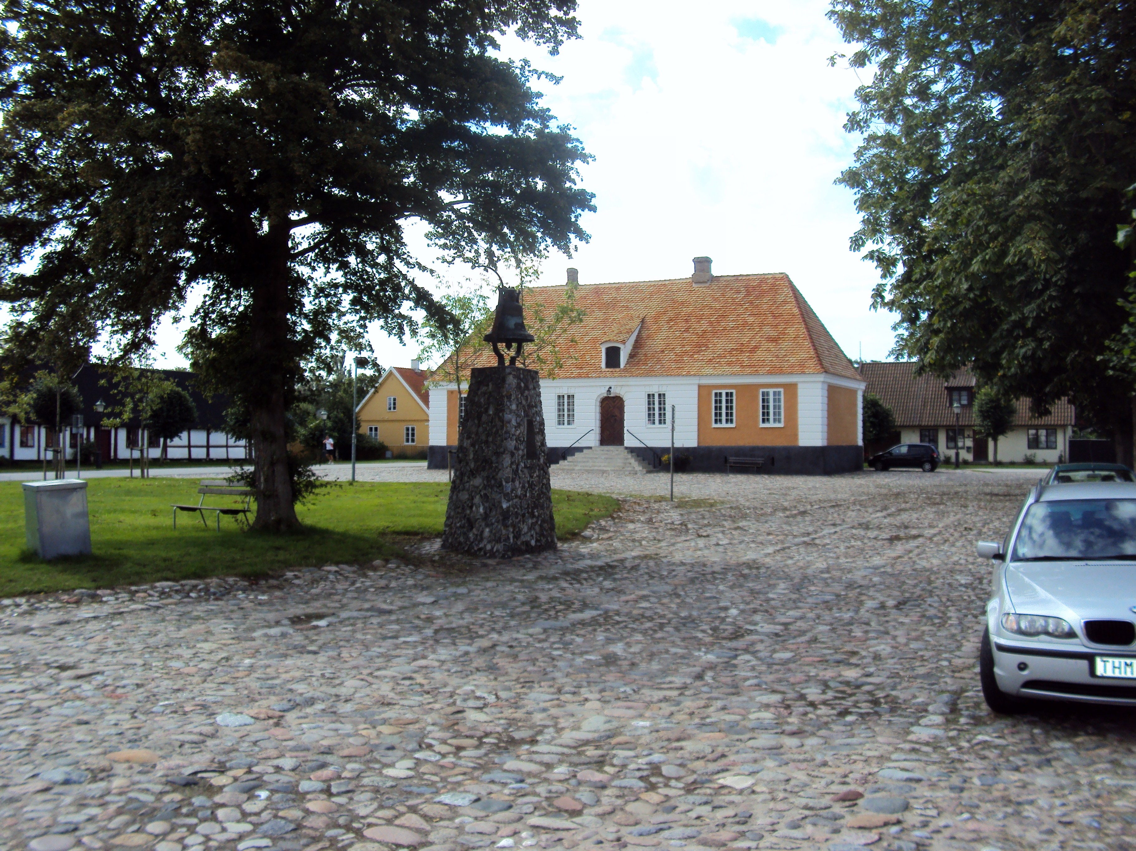 Rådhustorget i Skanör med Rådhuset i bakgrunden